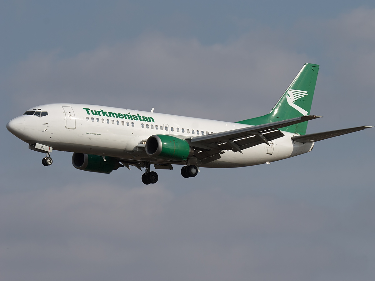 Turkmenistan Airlines Boeing 737-300